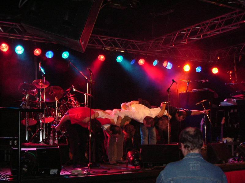 Martigan Band Live